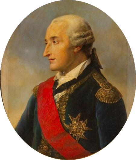 Jean-Baptiste Vaquette Fréchencourt de Gribeauval (1715-1789)